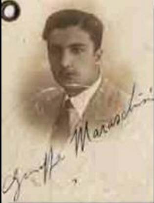 Ing. Giuseppe Maraschini progettista del Reggiane Re.2005